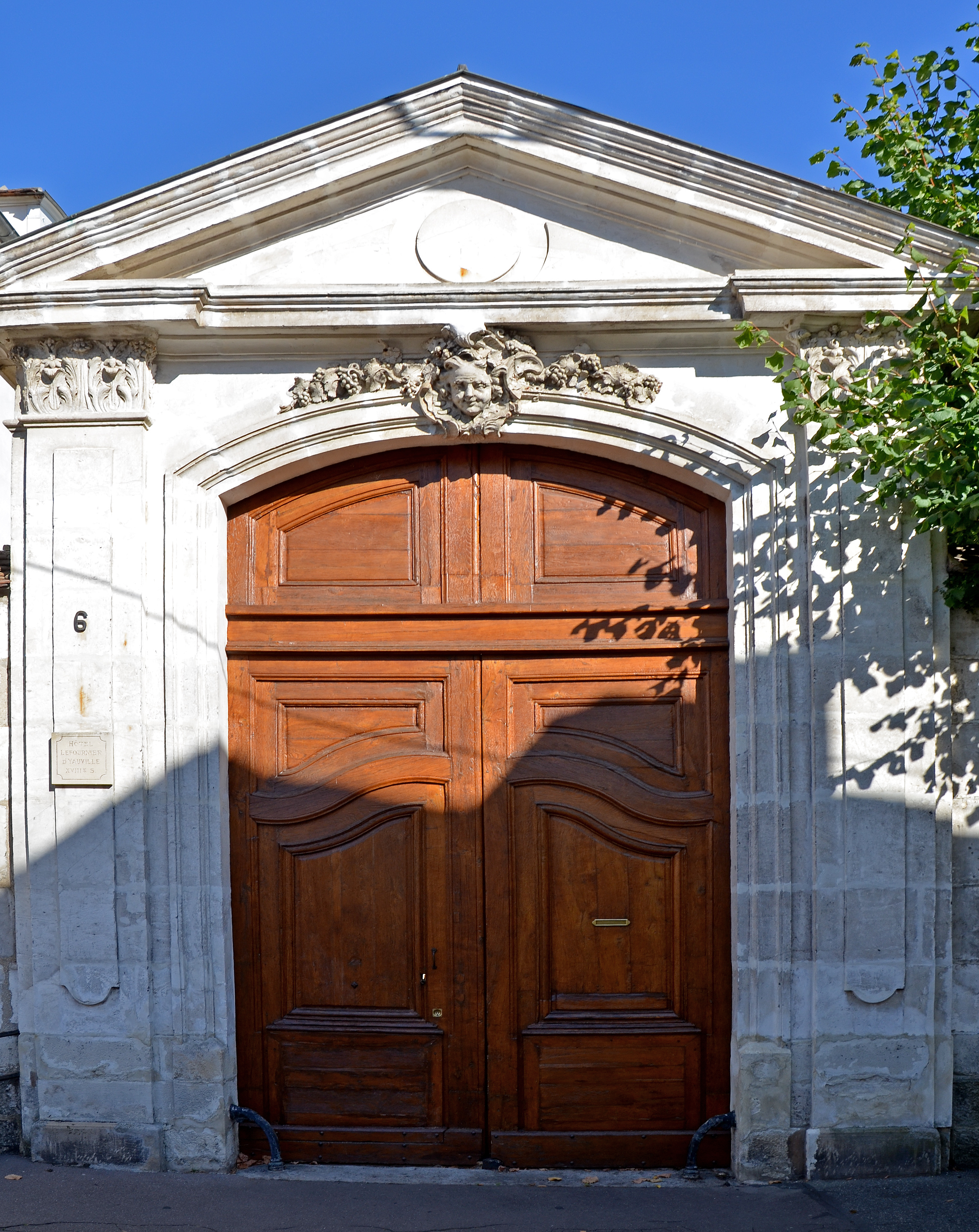 Portail de l'hôtel 6 rue Abelard à Sens, Yonne, Bourgogne, France